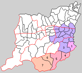 徳島県勝浦郡の町村制時点の町村。